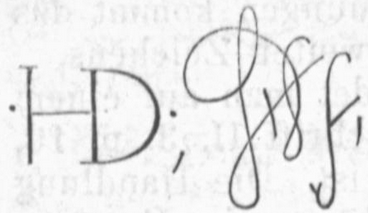 Monogramm aus Nagler: Die Monogrammisten, Band III., Nr. 821, S. 292